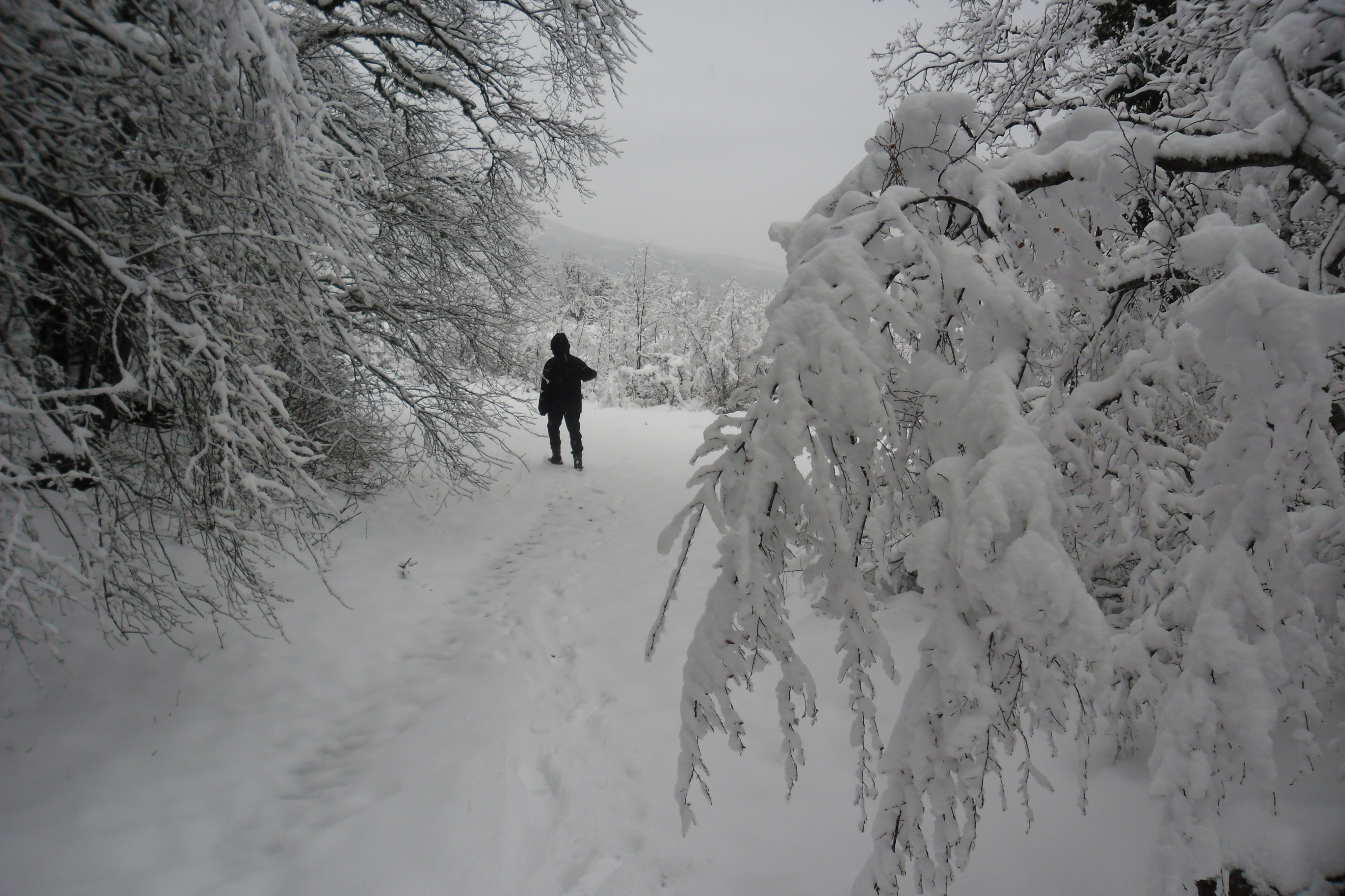 Фото